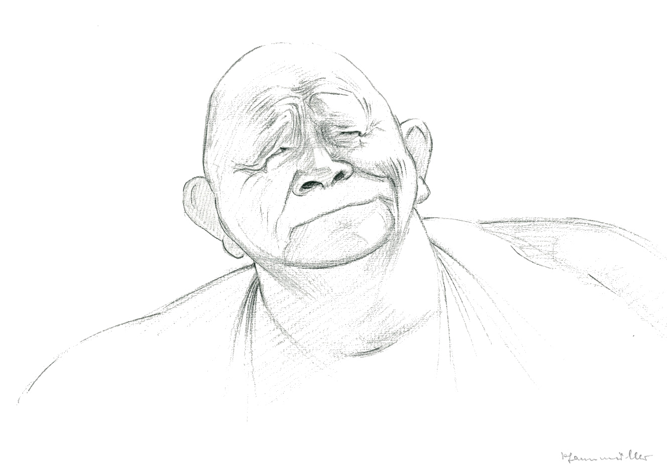 Karikaturzeichnung Professor Olaf Gulbransson